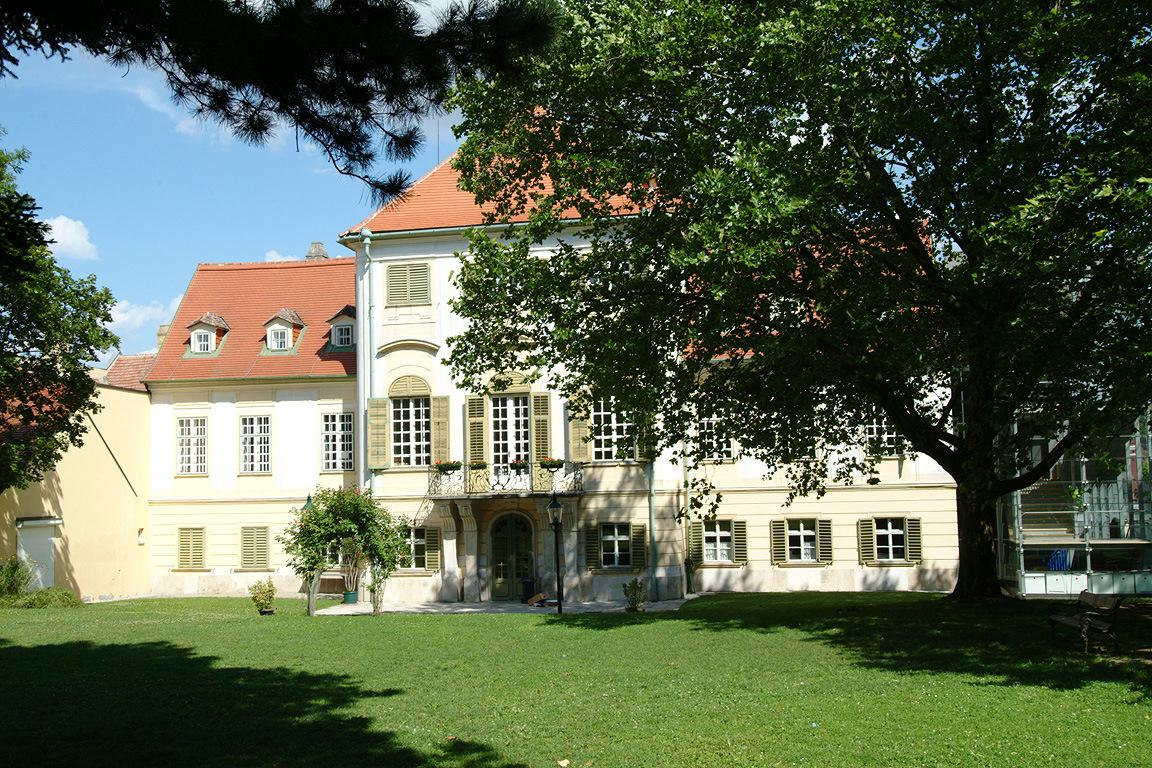 Maria Enzersdorf: Schloss Hunyadi, Schlossgasse 6